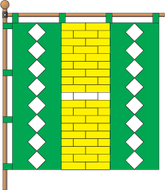 Прапор смт Наркевичі